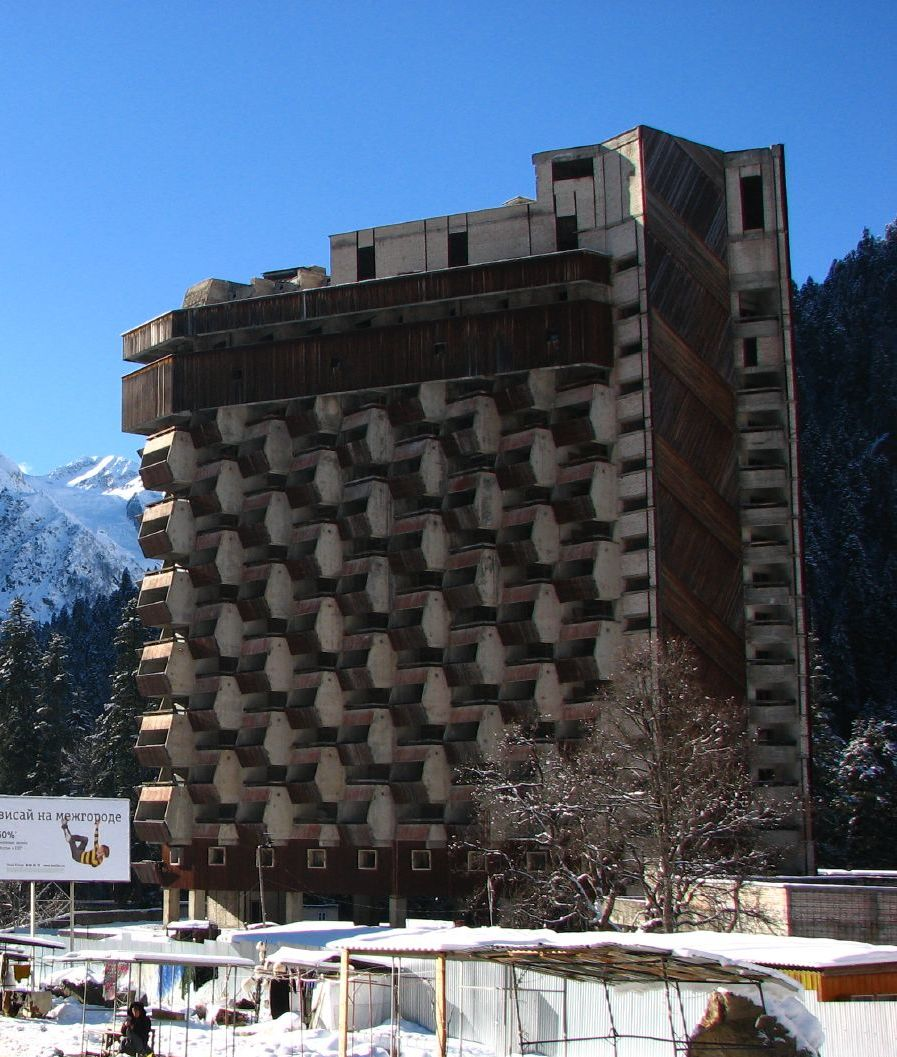 Застройка идт полным ходом, земля скупается в ожидании олимпиады - 2014 :)